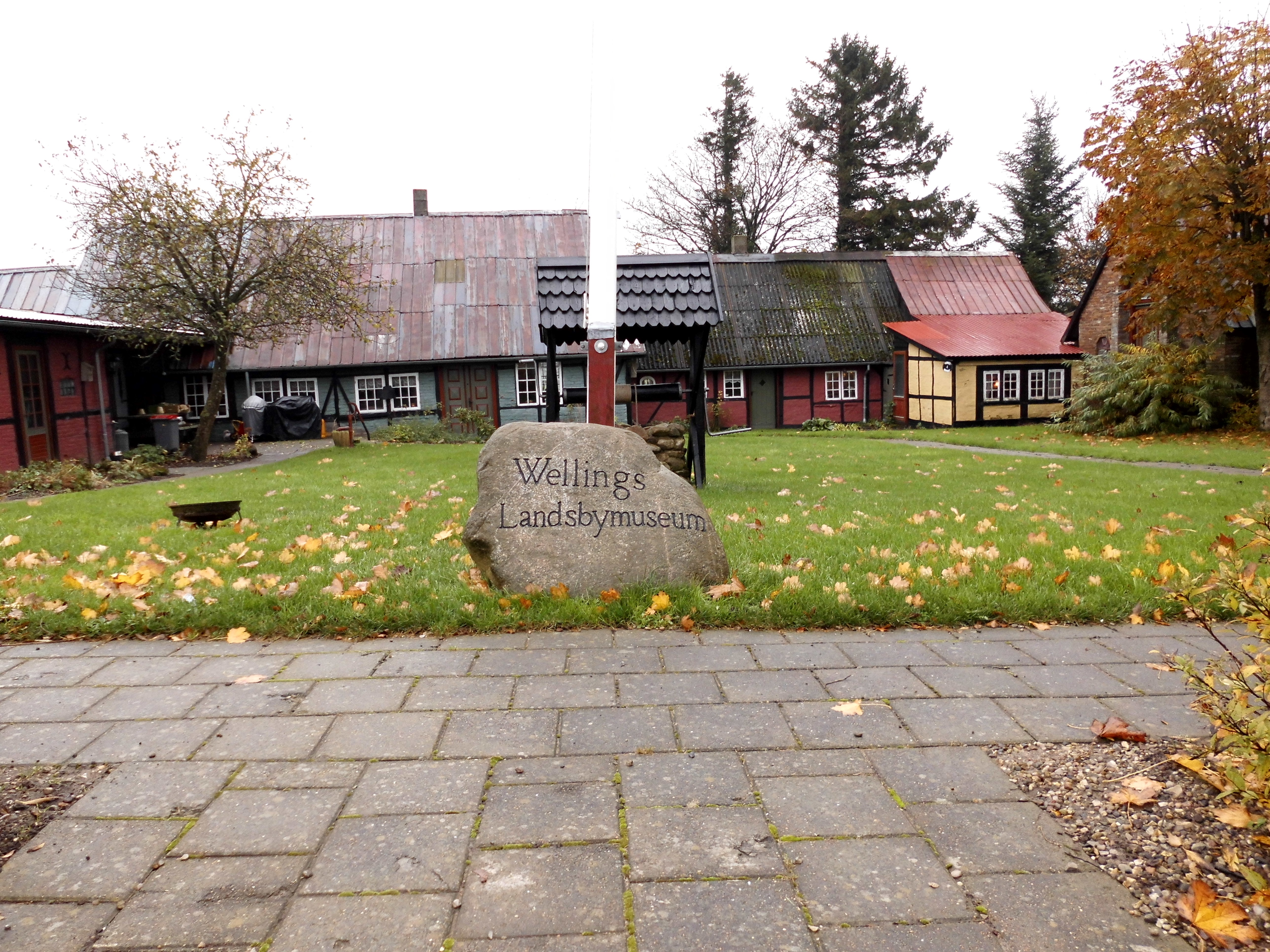 Aussenansicht vom Wellings Landsbymuseum in Lintrup, Dänemark